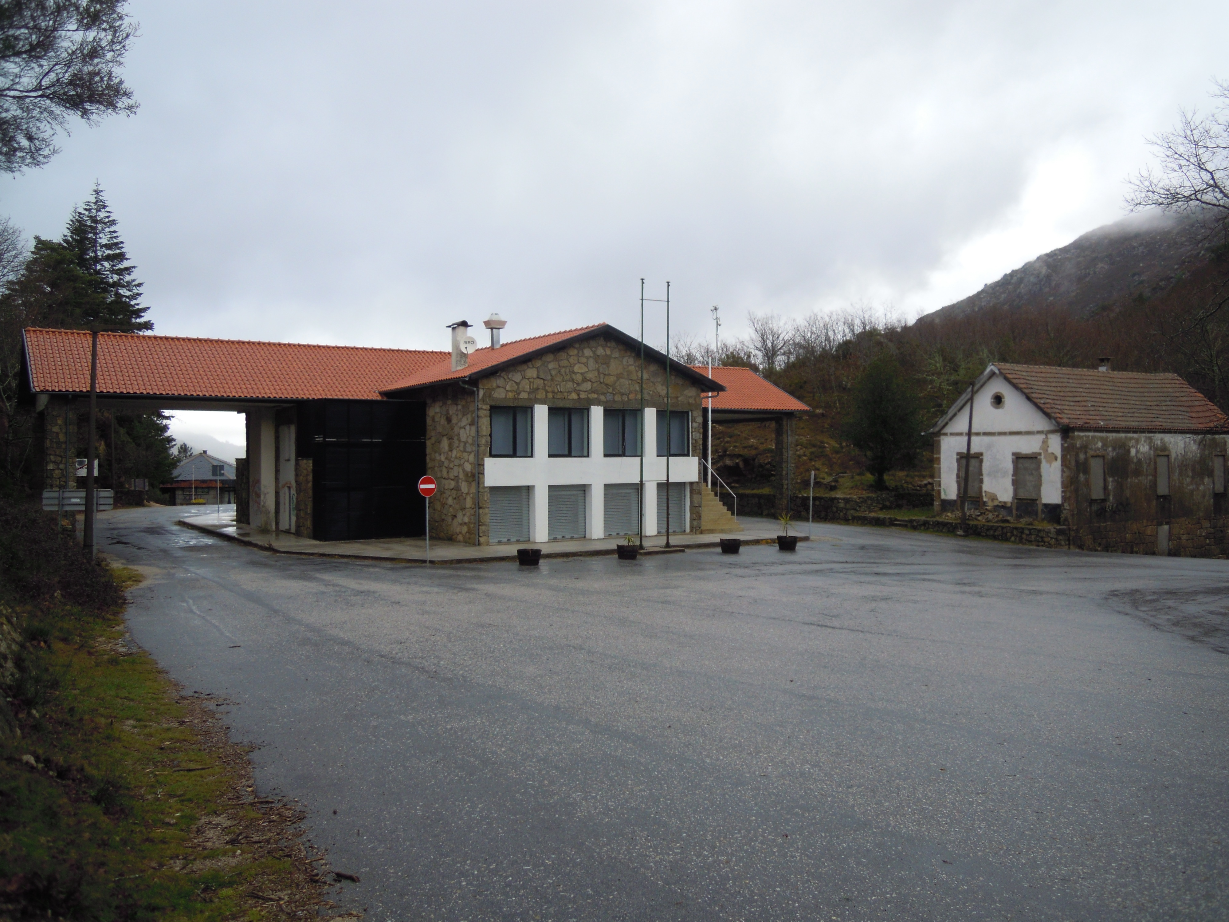 Alfándega na Portela do Home (Lobios)